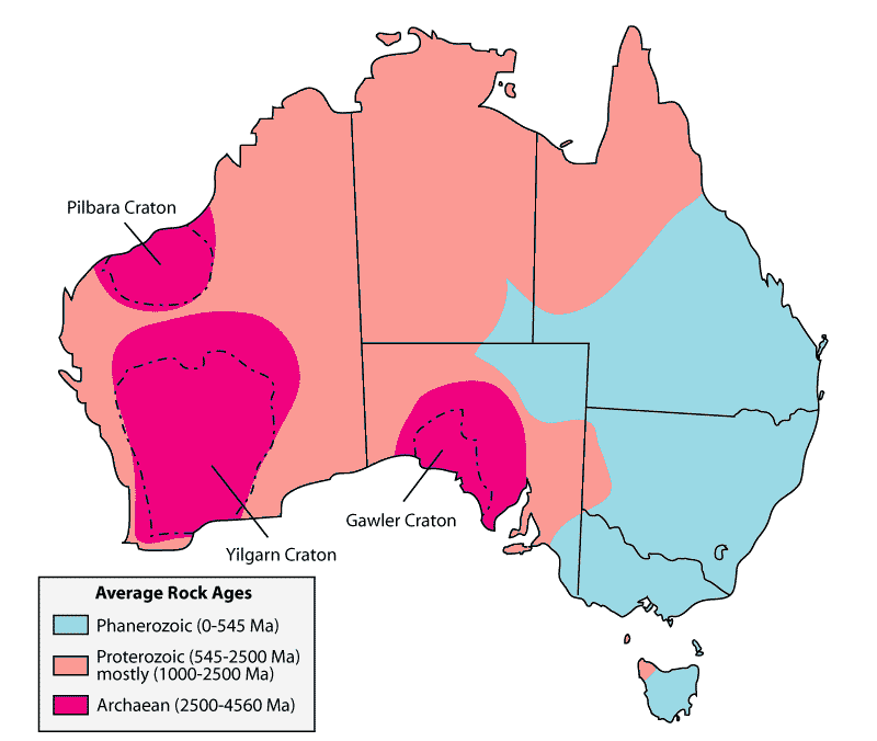 L'ages géologique des roches australiennes